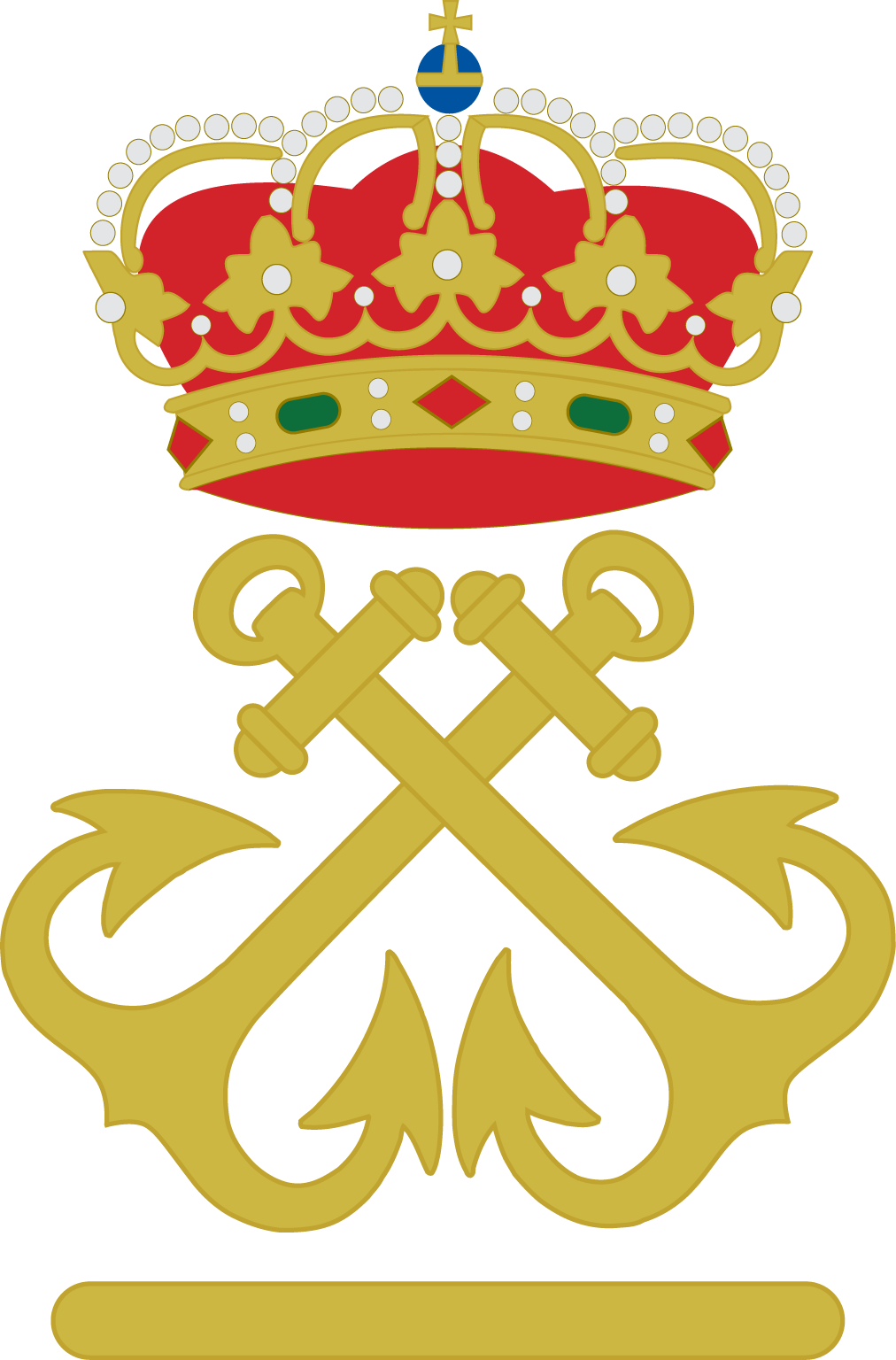 Distintivo de Patrón de Yate